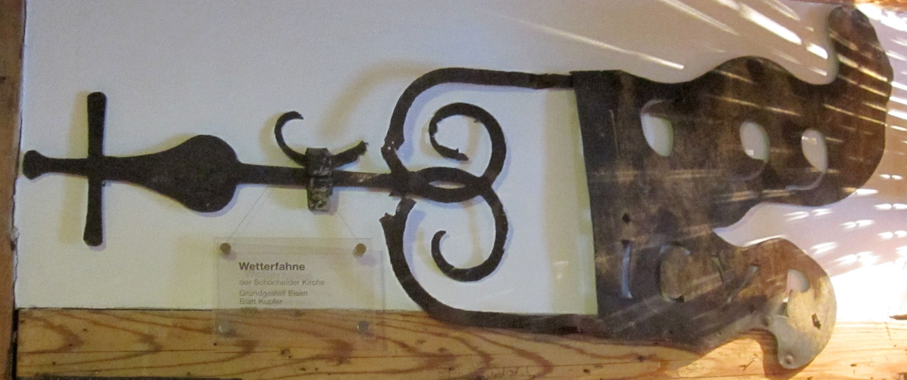 Schönheide im Erzgebirge: Wetterfahne vom Turm der Martin-Luther-Kirche aus dem Jahr 1699. Die Spitze des Turms erreicht eine Höhe von 43,5 Metern. Dieser Turm wurde wohl schon mit der ersten Kirche Schönheides 1596 errichtet und 1692 bis 1699 mit einem achteckigen Aufbau erhöht. Damit ist der Turm der älteste Teil der Kirche, denn das Kirchenschiff stürzte am 9. Januar 1764 ein und wurde von 1766 an (bis 1835) neu im Rokoko-Stil gebaut. Die im Jahr 2014 zu sehende Wetterfahne trägt die Jahreszahl „2000“ und erinnert damit an die gründliche Sanierung der äußeren Hülle Ende der 1990er und zu Beginn der 2000er Jahre. Die damals entfernte Wetterfahne trug die Jahreszahl „1699“ und die Buchstaben „ICV.P.“. Diese Buchstabenkombination ziert auch die Wetterfahne des Jahres 2000. Die alte Wetterfahne von 1699 wird im Schönheider Bürsten- und Heimatmuseum ausgestellt.